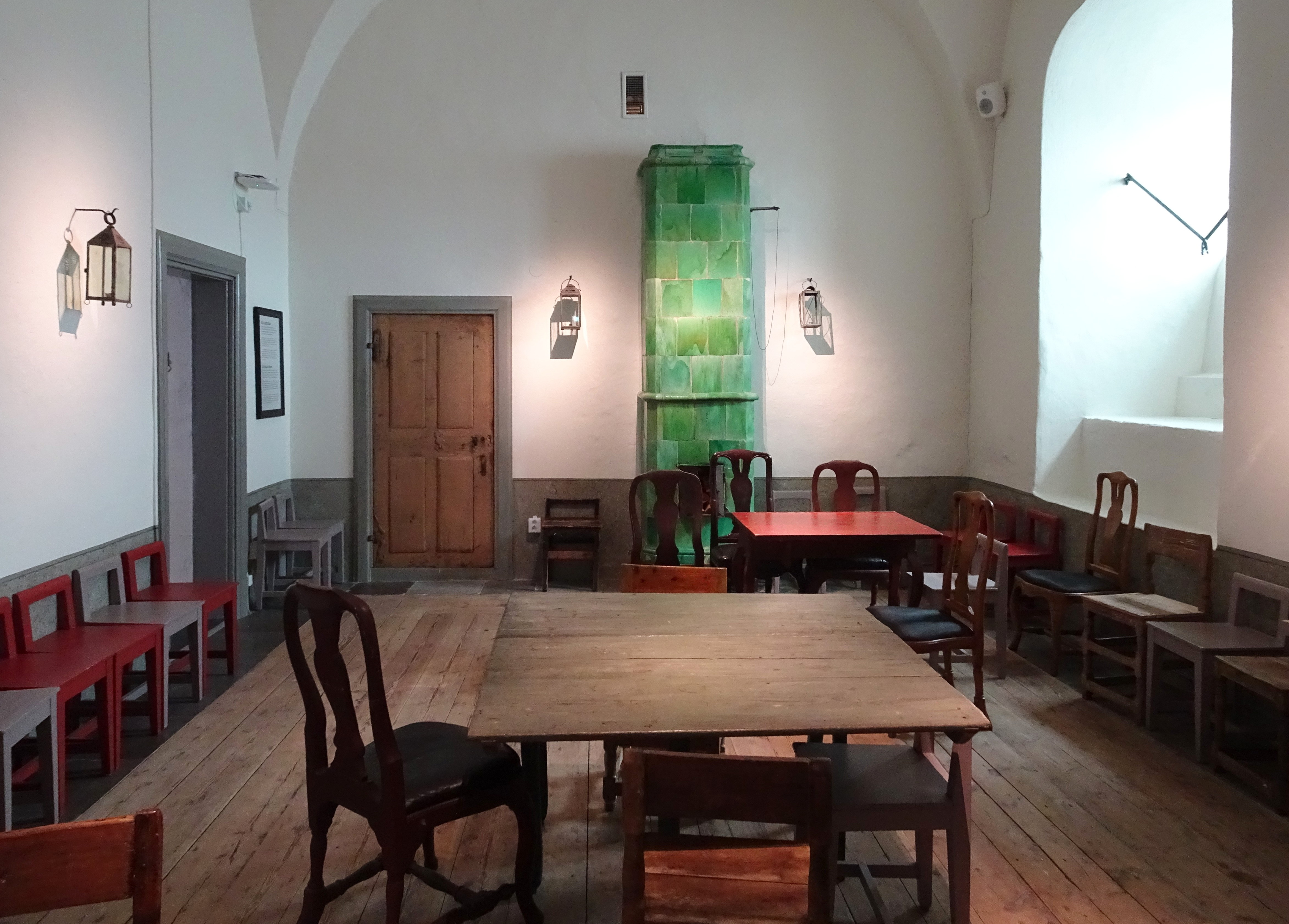 Södra stadshuskällaren (rekonstruktion) i Stockholms satdsmuseum